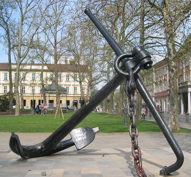 Anchor-statue in Kongresni trg, Ljubljana photo:Ziga 09:10, 27 April 2006 (UTC)